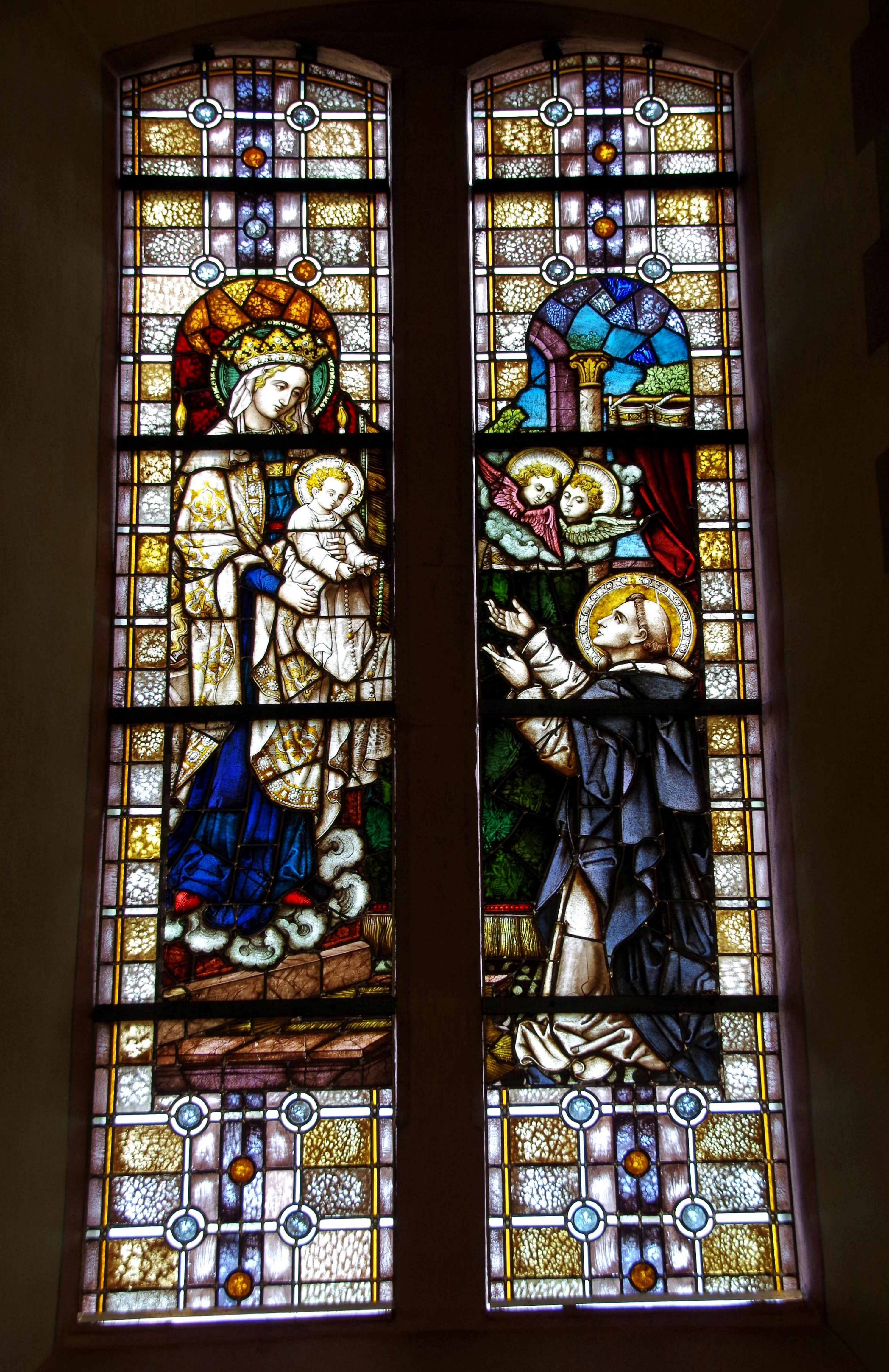 St. Dionysius Keldenich, Chorfenster